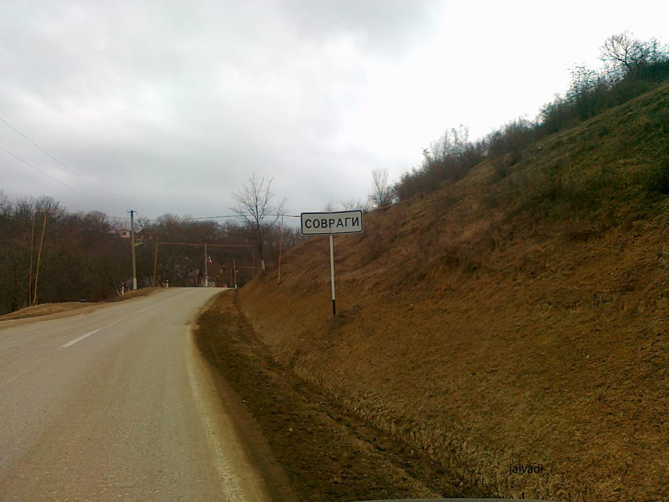 Нохчийн: Совраги